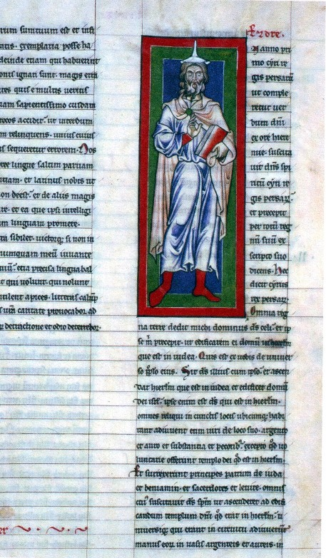 Prophet Esra (Bibelhandschrift des Arnsberger Klosterschreibers Ludovicus um 1220)